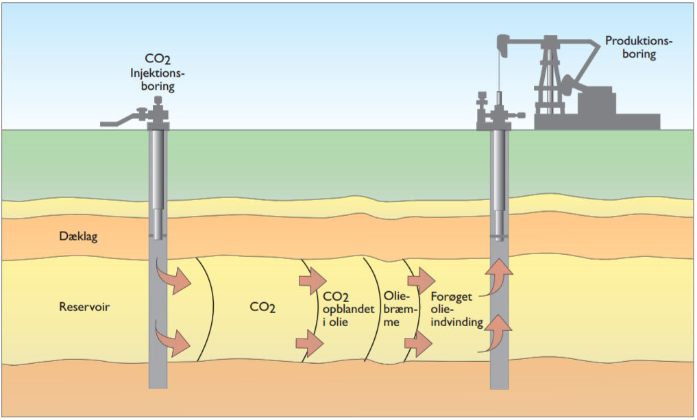 Tegning som viser forøget olieudvinding ved injektion med CO2; eksempel fra Canada.